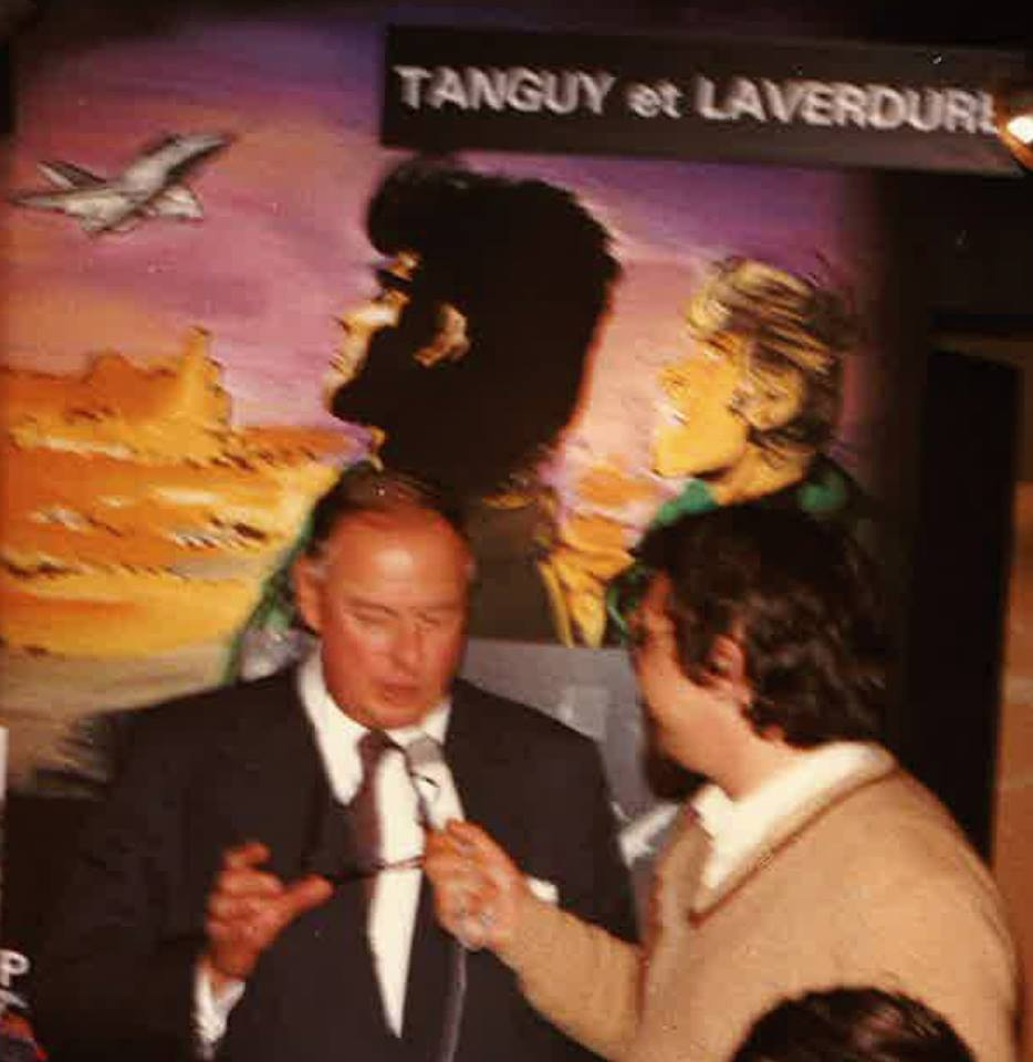 Jean-Michel Charlier lors du festival d'Angoulême en 1983.